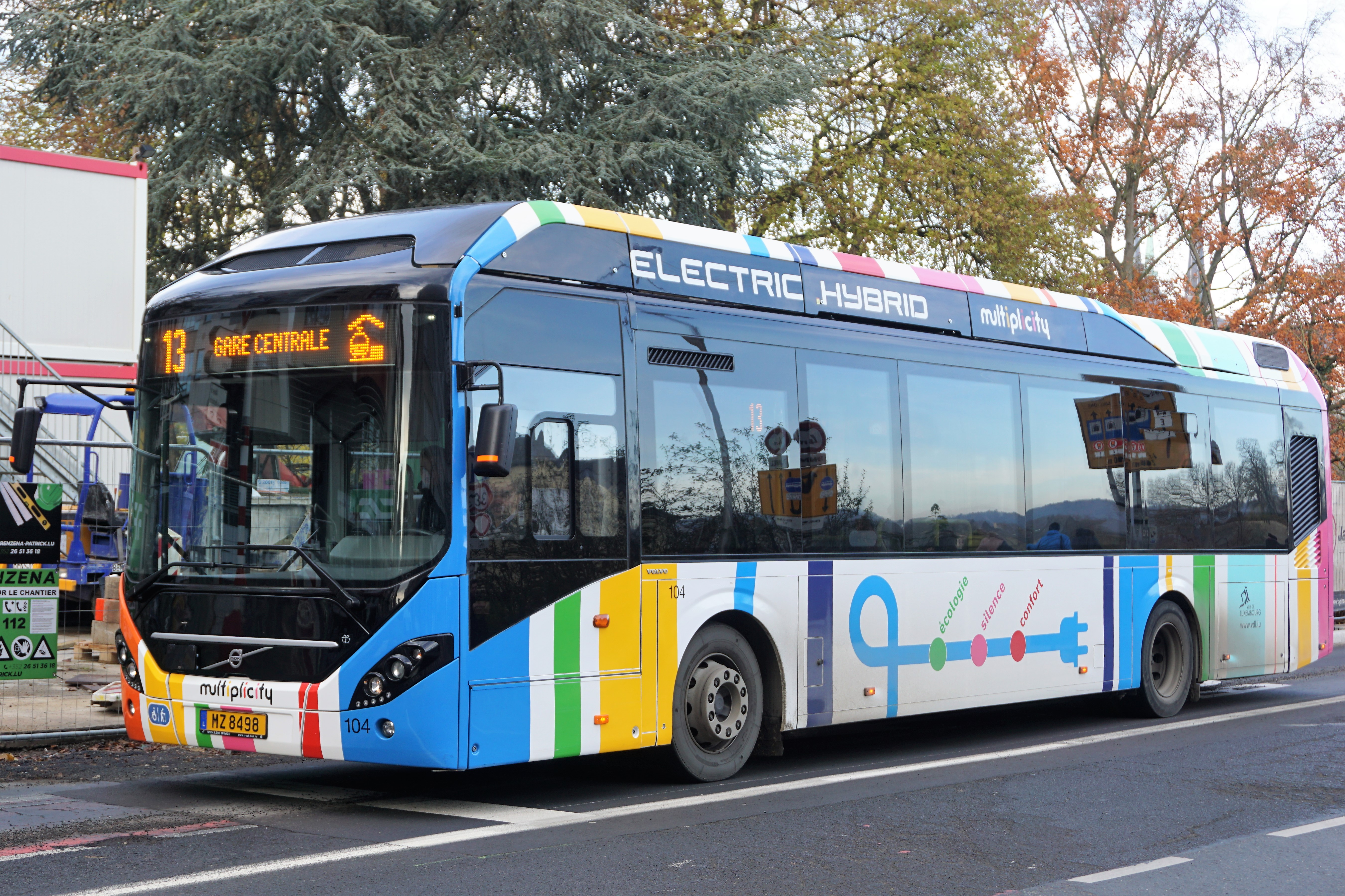 Luxembourg, bus AVL 104 (#MZ8498) sur une ligne 13 du pont Viaduc en direction de la Gare Centrale.